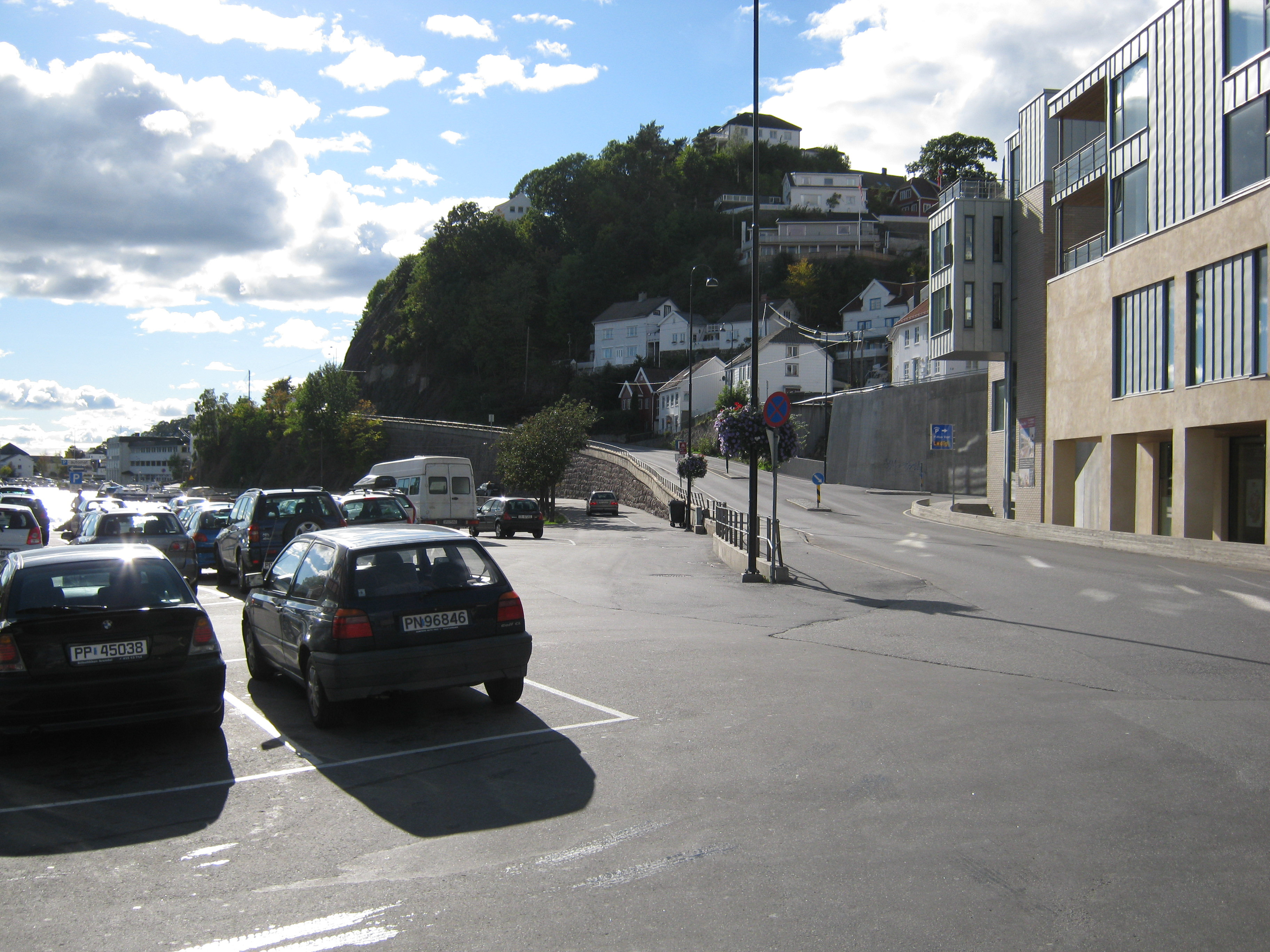 Vesterveien i Arendal sentrum